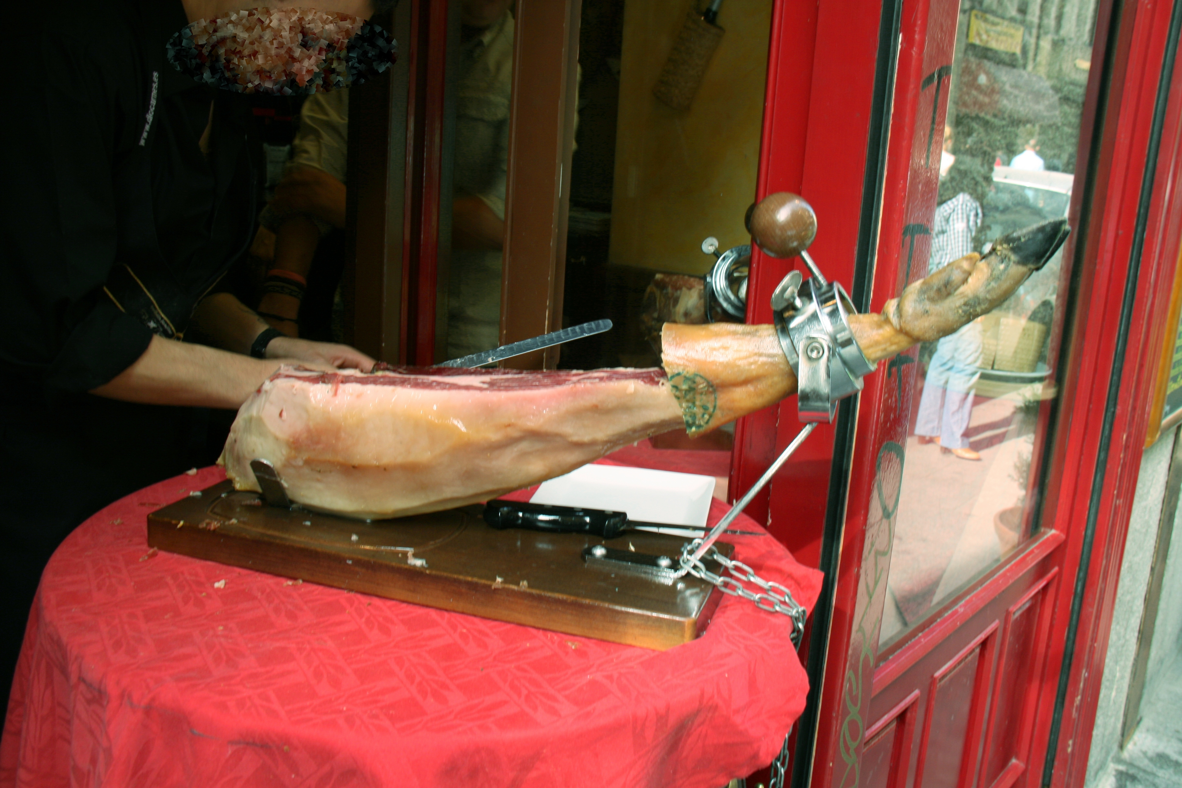 Cortando jamón sobre una jamonera.